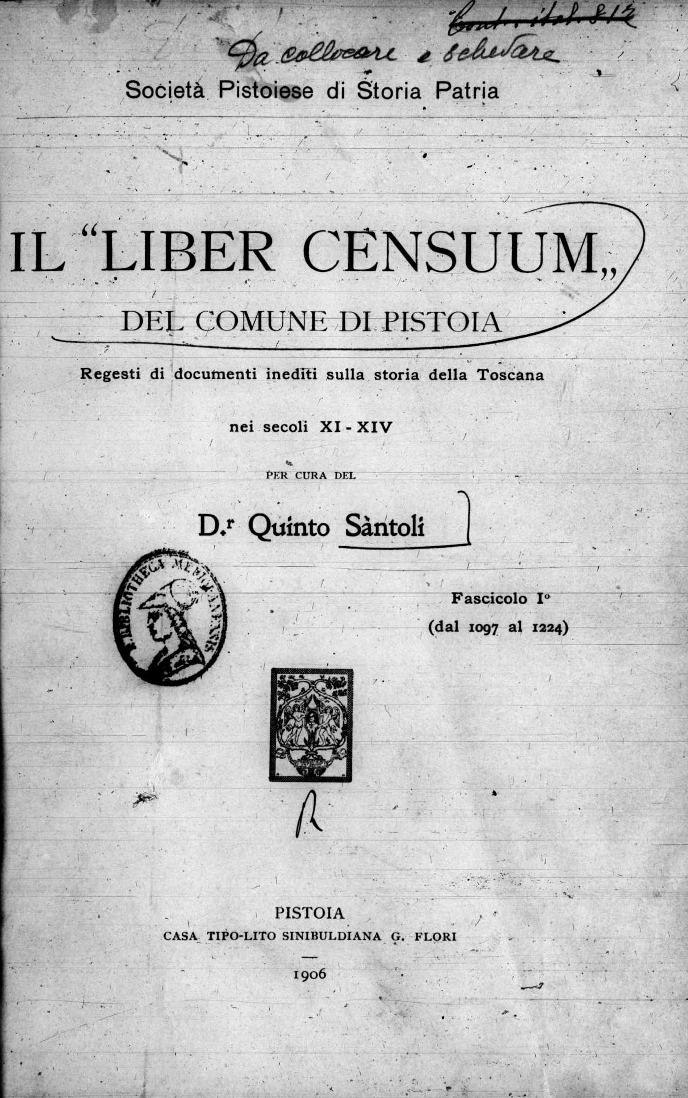 Frontespizio